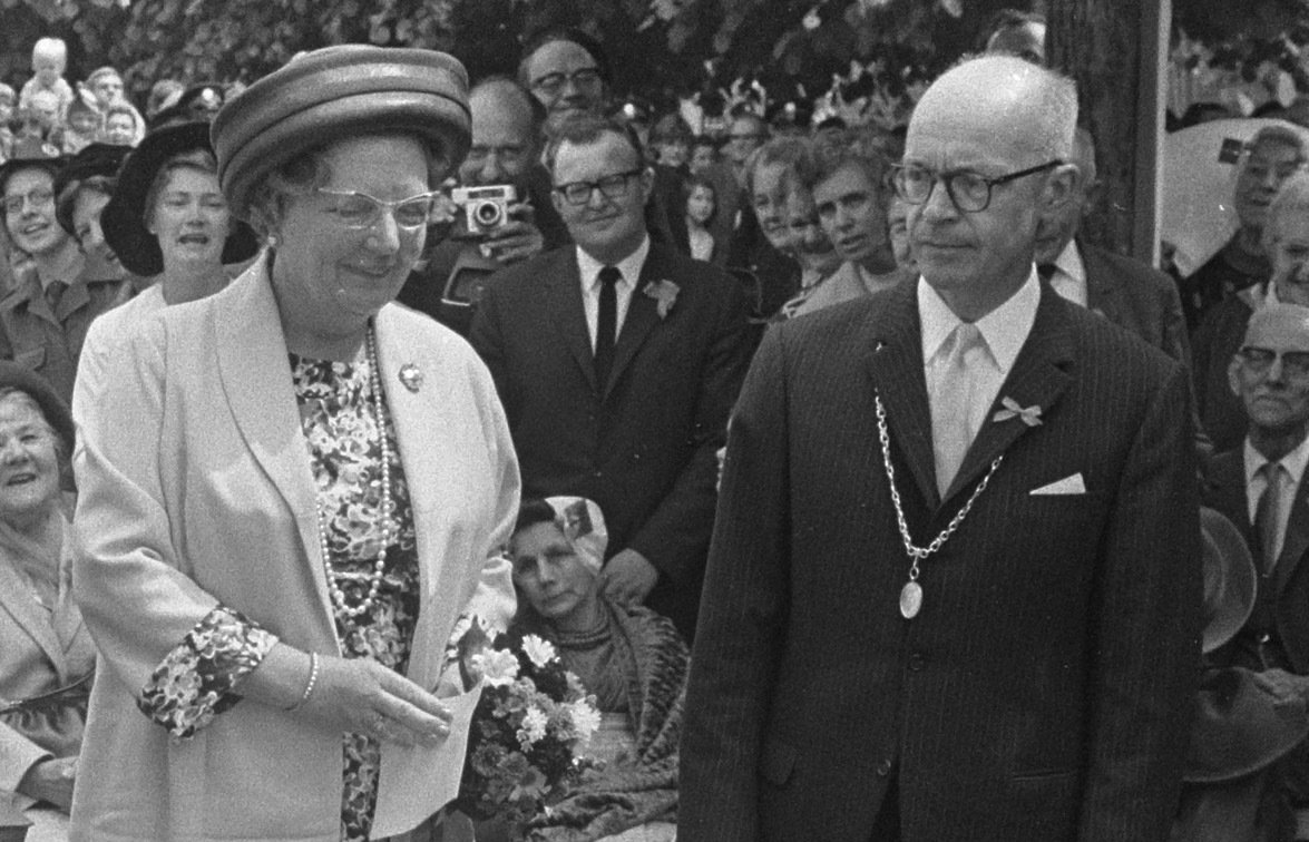 Collectie / Archief : Fotocollectie Anefo Reportage / Serie : [ onbekend ] Beschrijving : Koningin in Wemeldinge (Zeeland) Datum : 3 juni 1967 Locatie : Wemeldinge, Zeeland Trefwoorden : bezoeken, koninginnen Fotograaf : Koch, Eric / Anefo Auteursrechthebbende : Nationaal Archief Materiaalsoort : Negatief (zwart/wit) Nummer archiefinventaris : bekijk toegang 2.24.01.05 Bestanddeelnummer : 920-3762